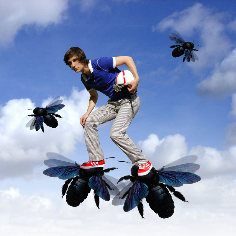 Dattola